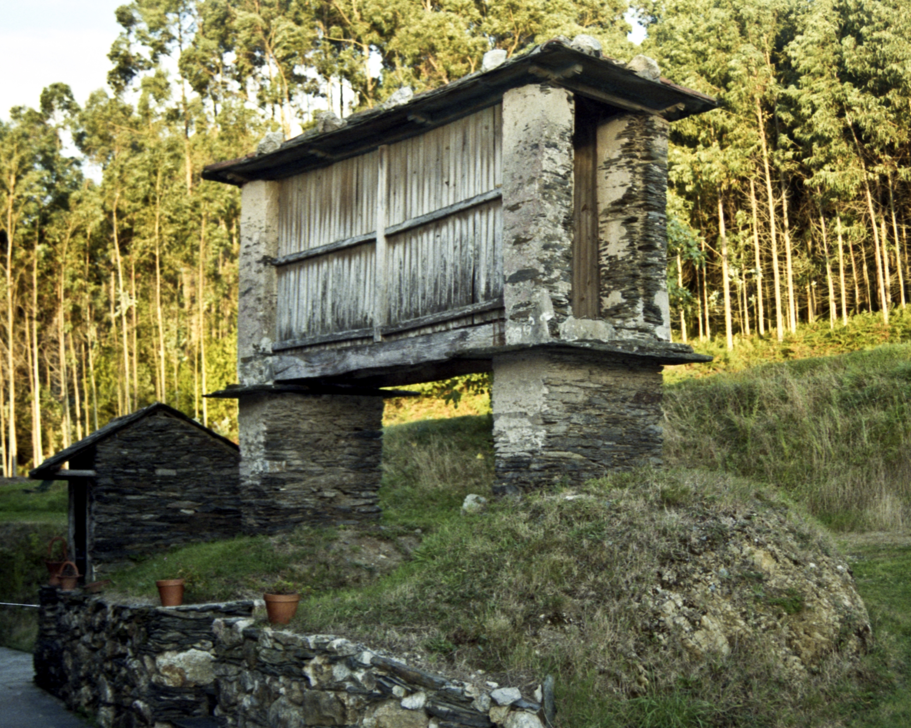 Hórreo, Loiba, Ortigueira